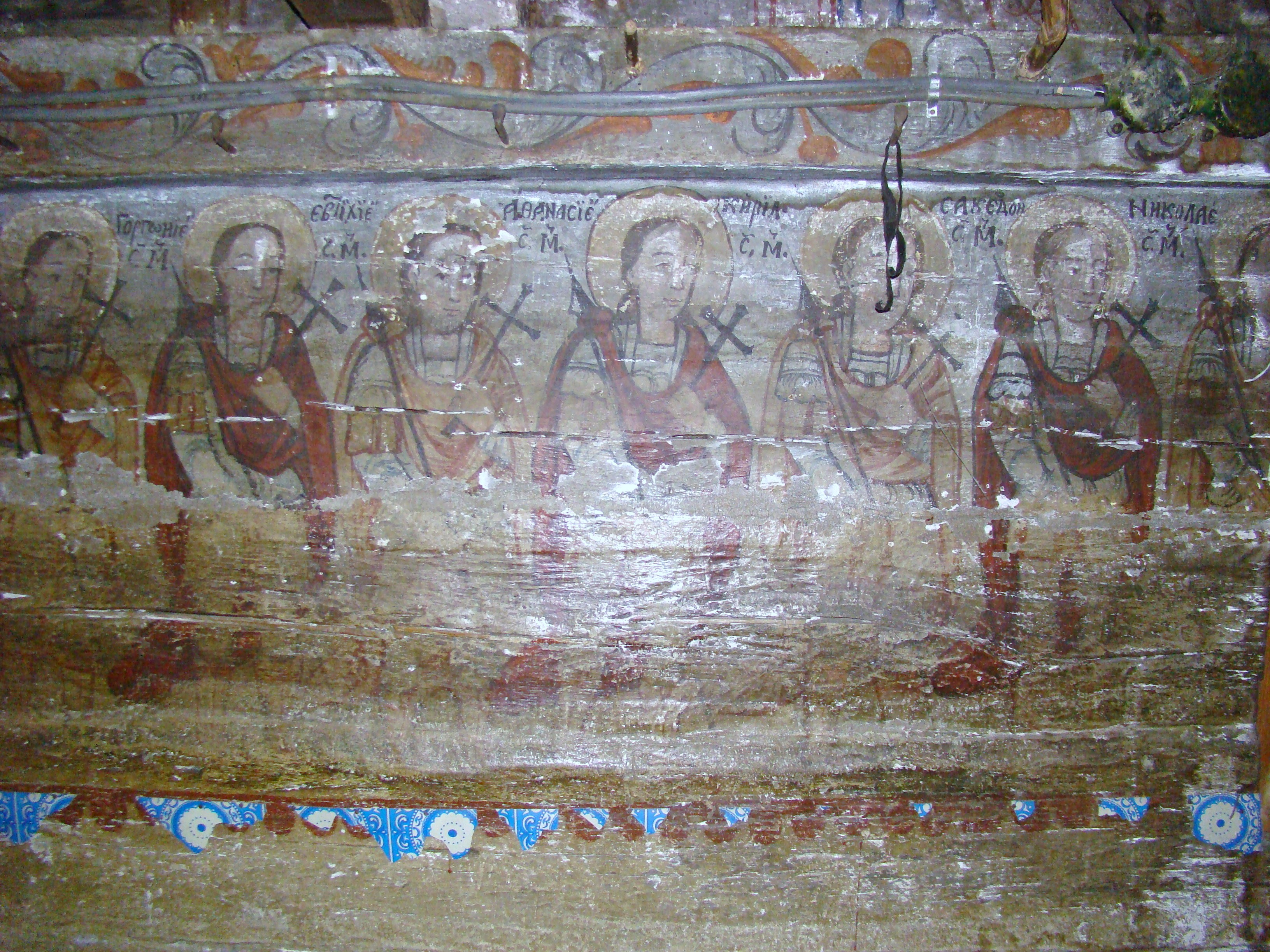 Biserica Sfinţii Arhangheli, Sat Brusturi, Comuna Creaca, județul Sălaj